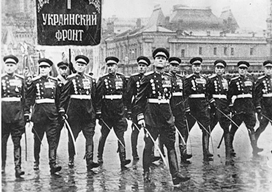 Маршал Советского Союза И.С. Конев во главе парадного расчета 1-го Украинского фронта на Параде Победы 24 июня 1945 г.